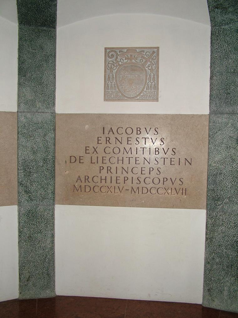 Grab von Erzbischof Liechtenstein in Salzburg